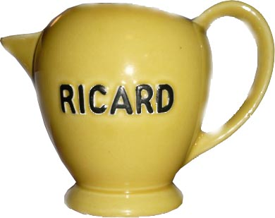 Pichet à eau publcitaire Ricard, Manufacture Revol, Saint-Uze